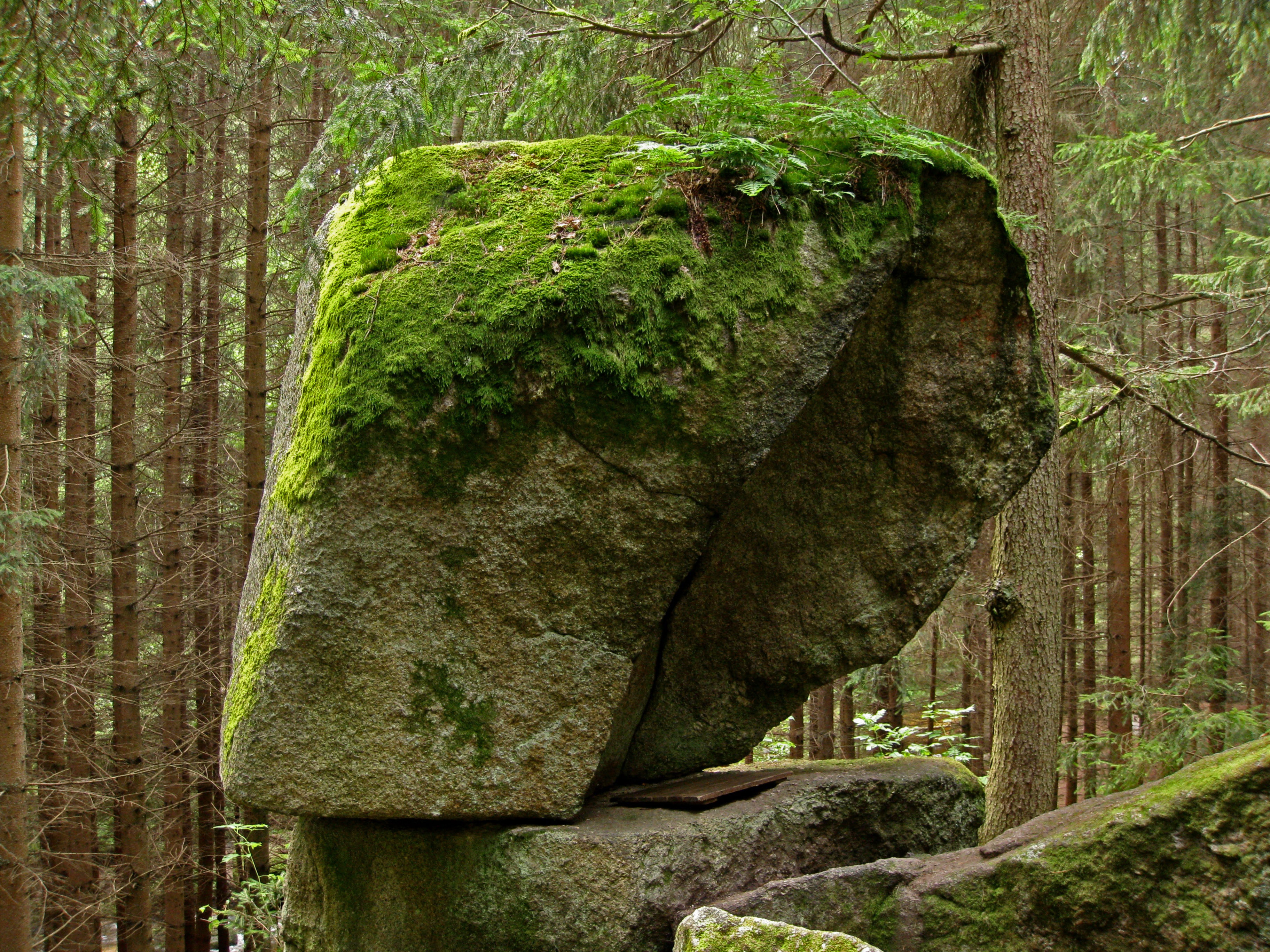 Wackelstein bei Harruck / Groß Gerungs